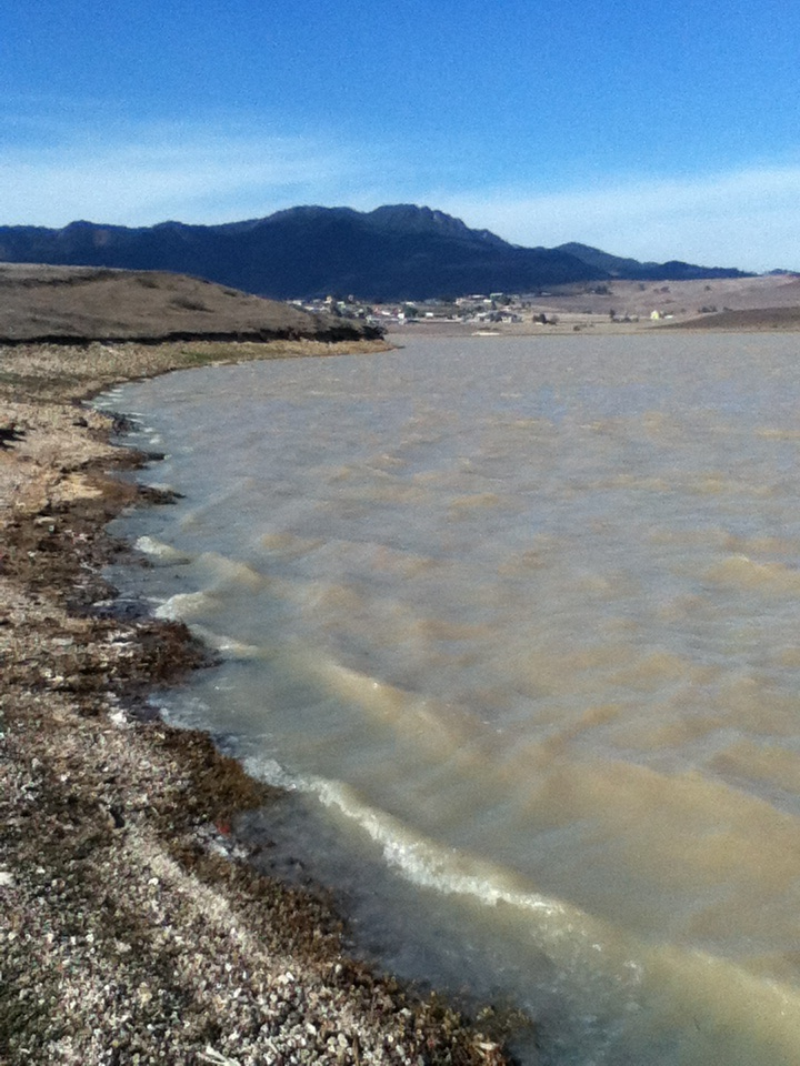 Presa a las cercanías de Metepec - Hidalgo